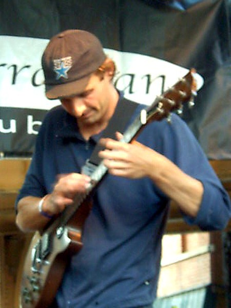 Sam Zurick